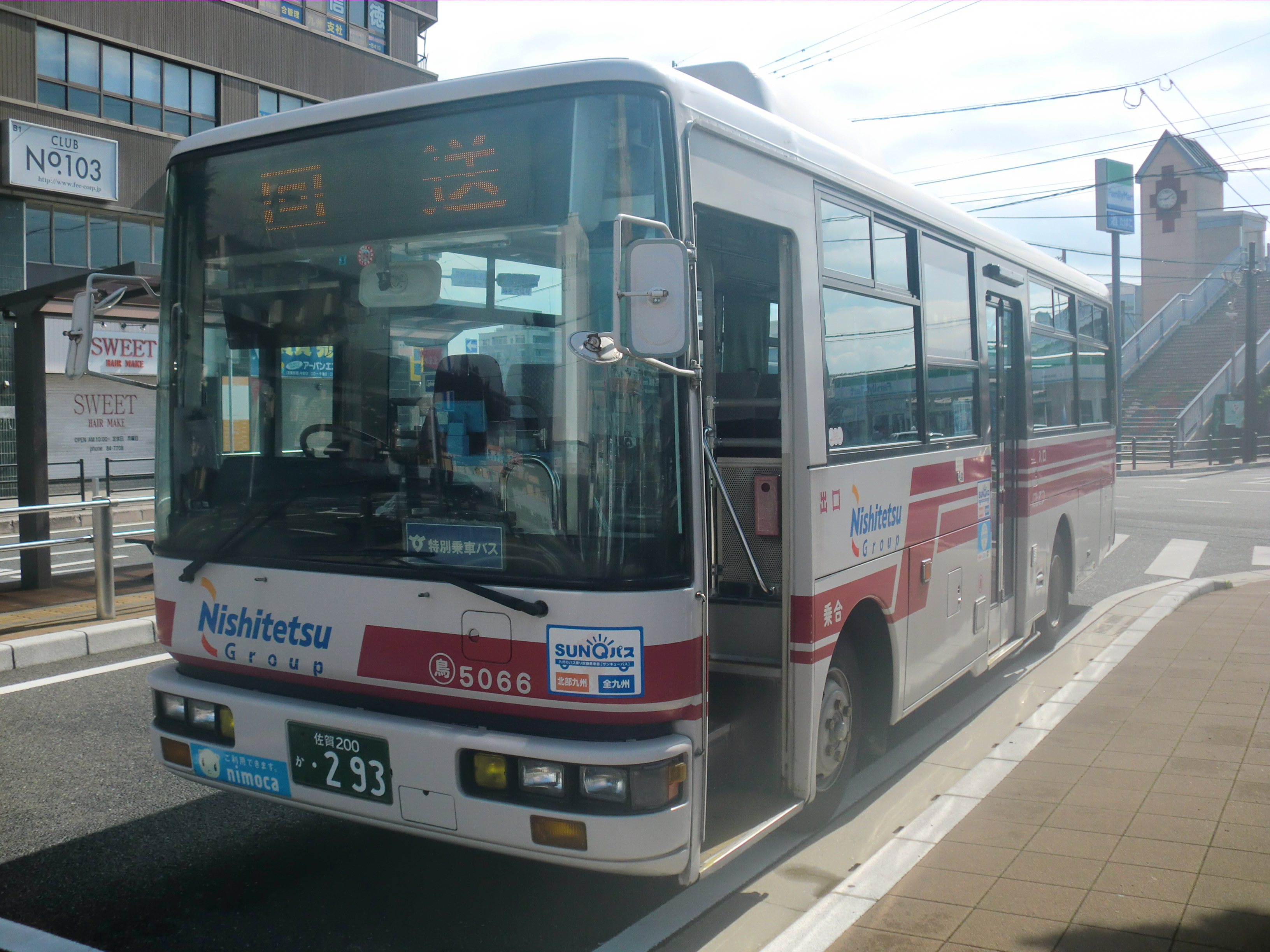 西鉄バス佐賀鳥栖支社のバス。（鳥栖駅前で撮影。特別乗車バス）